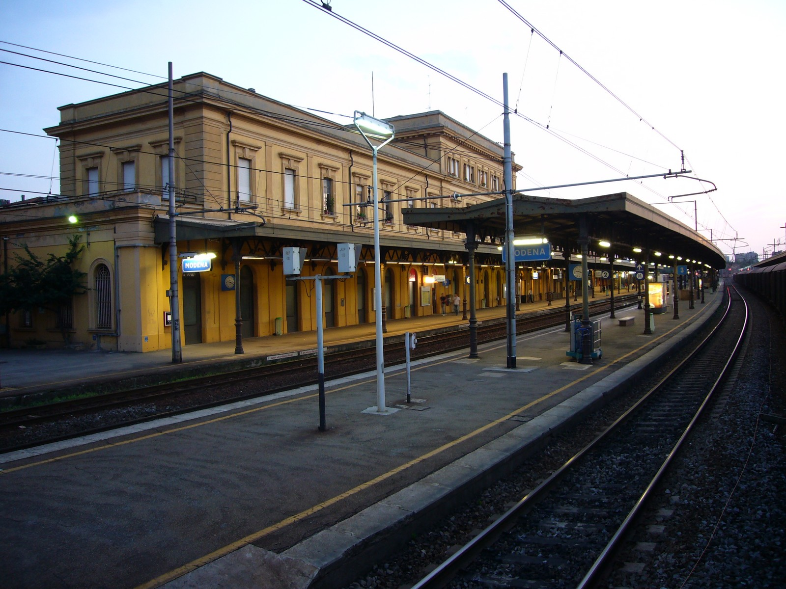 Stazione di Modena, Emilia-Romagna, Italia